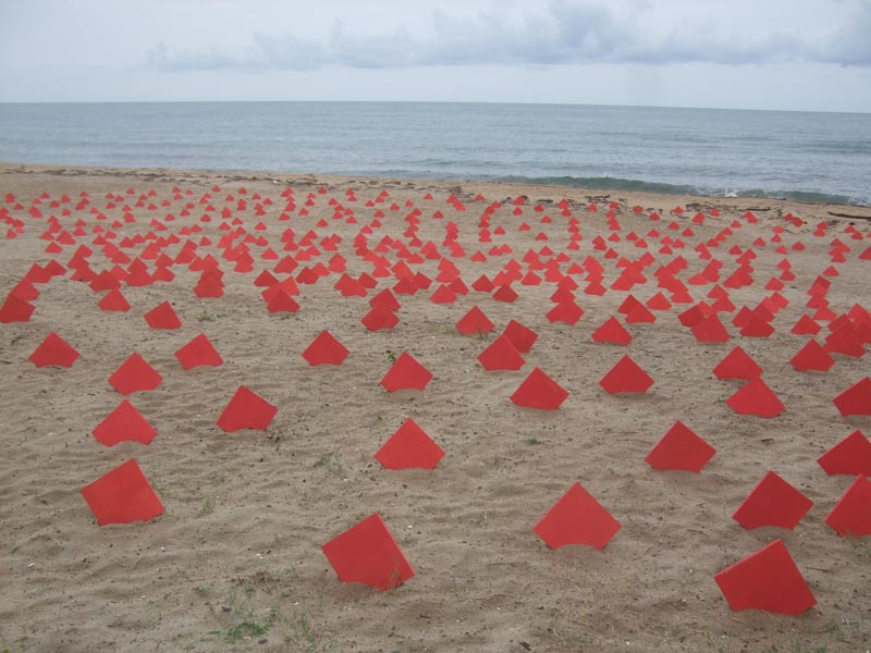 太陽のヒカリが海岸のオブジェを照らす。